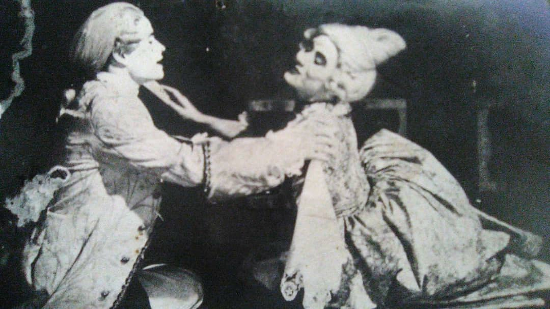 Obra: Ópera de Esmirna realzada en el año 1990